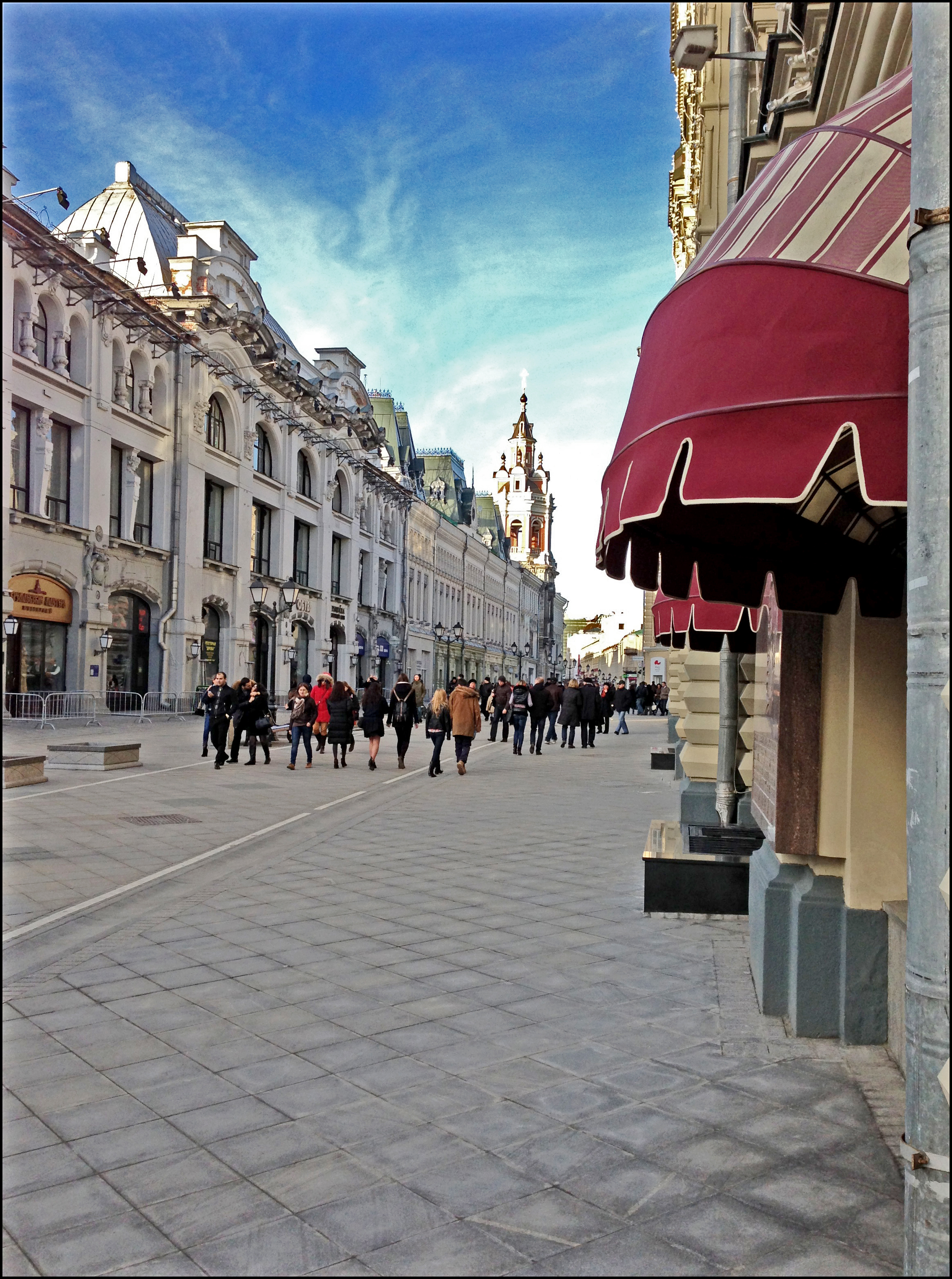 Никольская улица